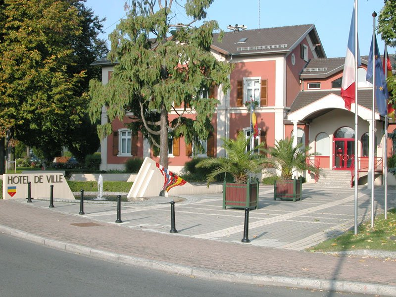 L'h1otel de ville de Huningue